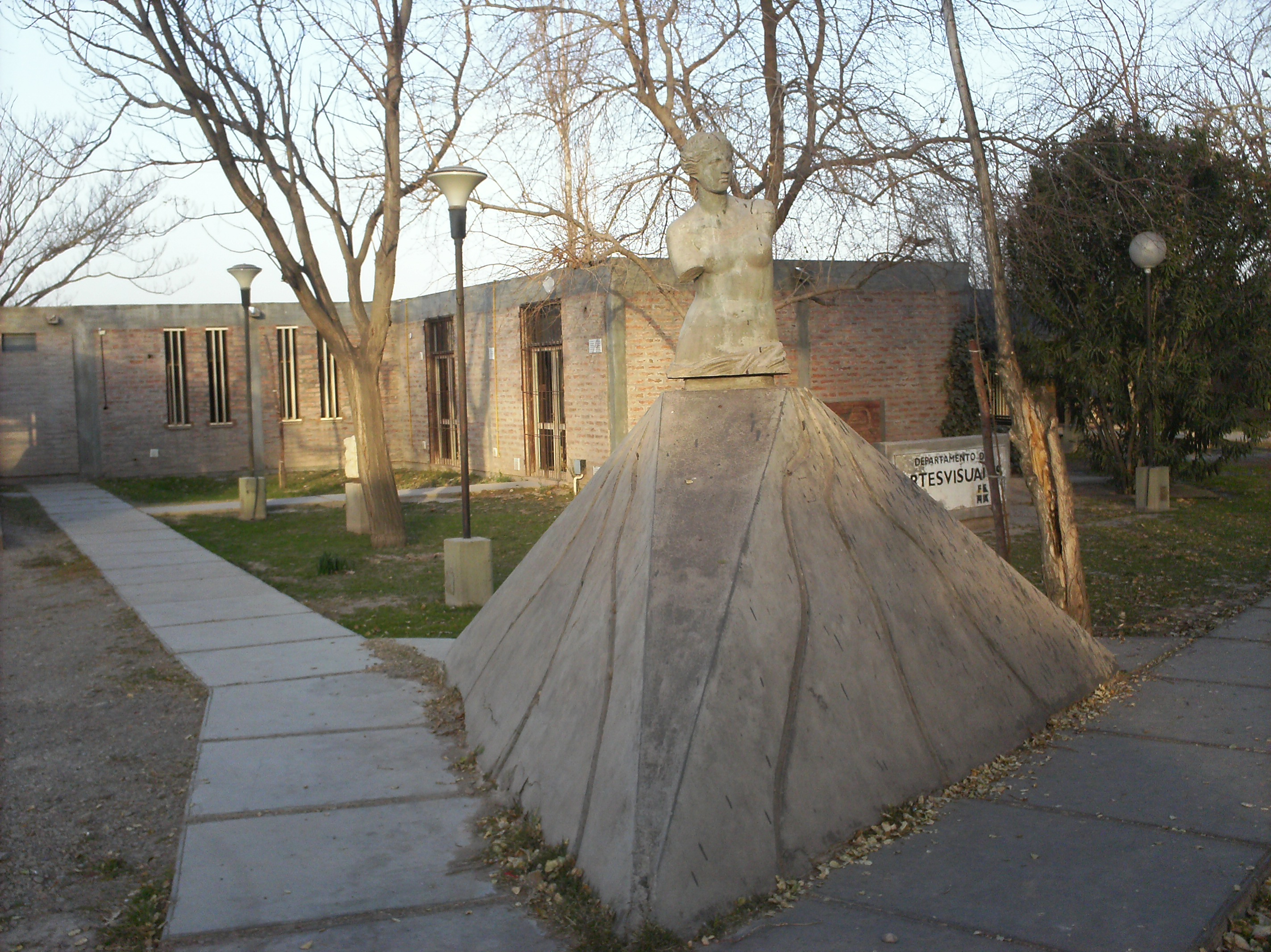 Departamento de Artes visuales de la Facultad de Filosofia, Humanidades y Artes en el CUIM (Complejo Universitario Islas Malvinas), departamento Rivadavia, provincia de San Juan